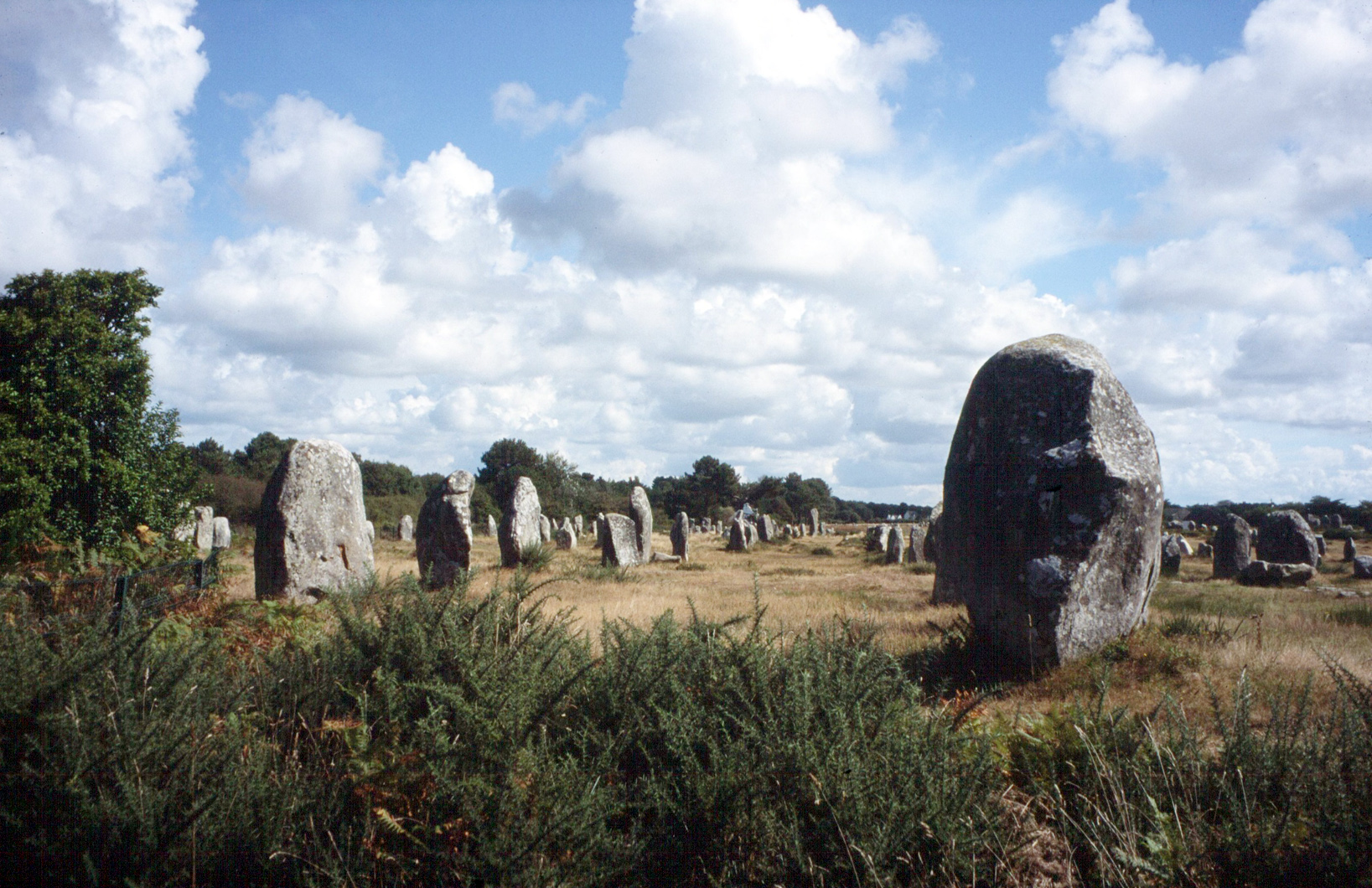 Megalith-Reihen bei Carnac, Bretagne, Frankreich.